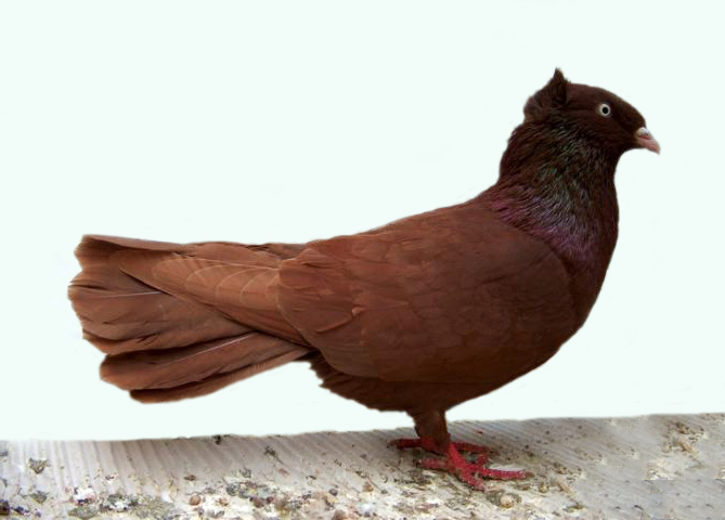 Danzig Highflier (recessive red)